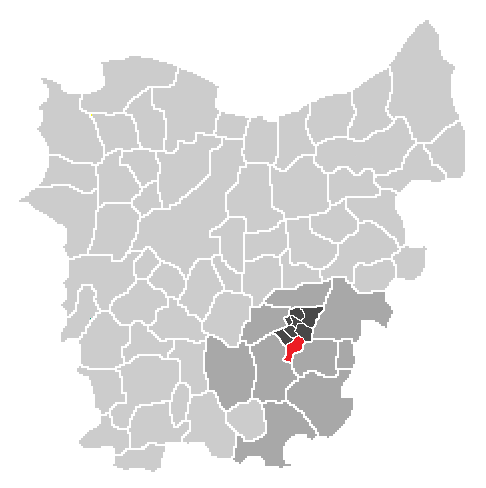 Oost-Vlaanderen uitgeknipt en bewerkt